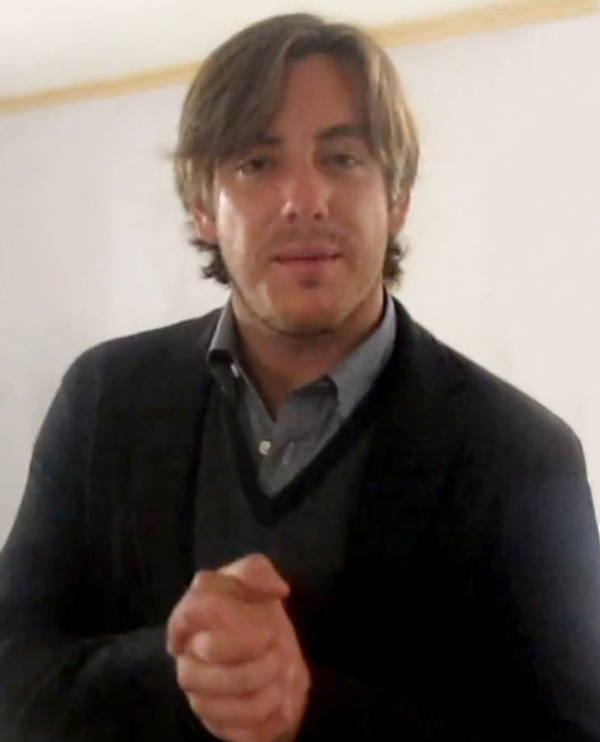 Juan Diego Covarruvias actor mexicano